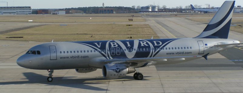 Airbus A320 (PH-VAC) von V Bird auf dem Rollfeld des Flughafen Berlin-Schönefeld. Selbst erstellt am 24.2.2004 durch David Herrmann.